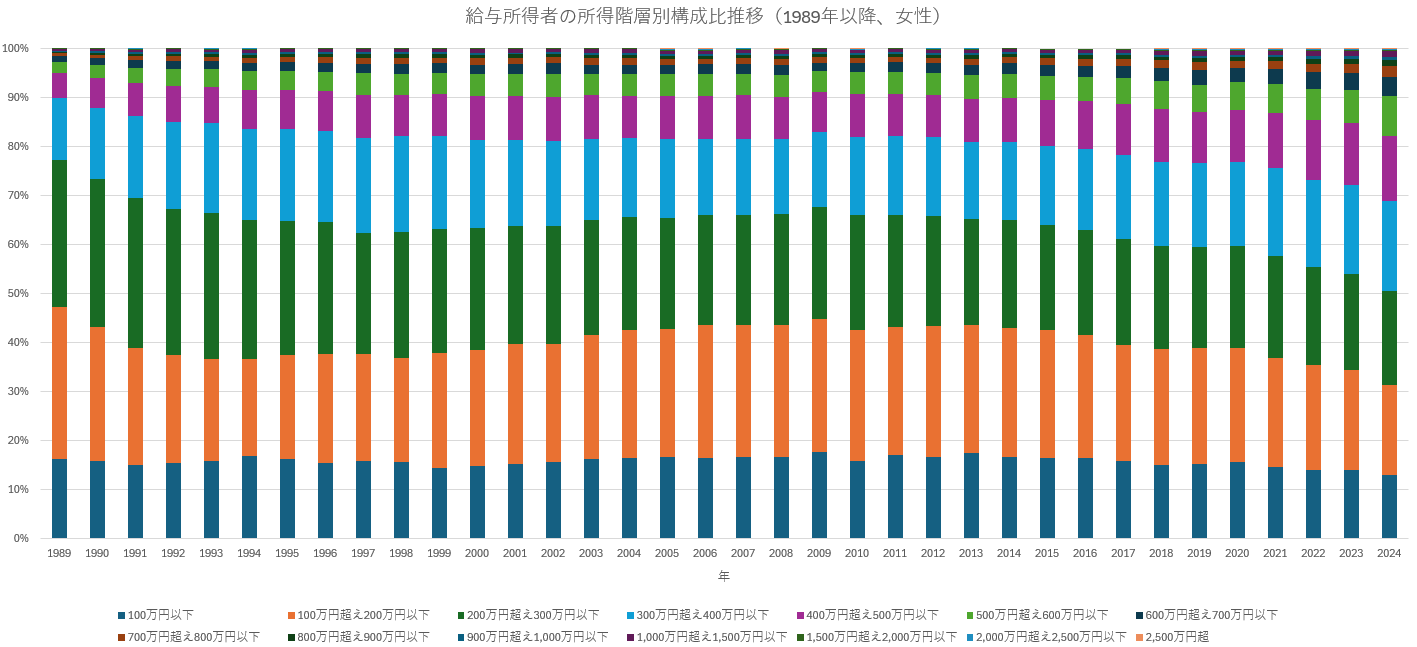 1989年以降の女性給与所得者の所得階層別構成比推移（100%積み上げ縦棒）